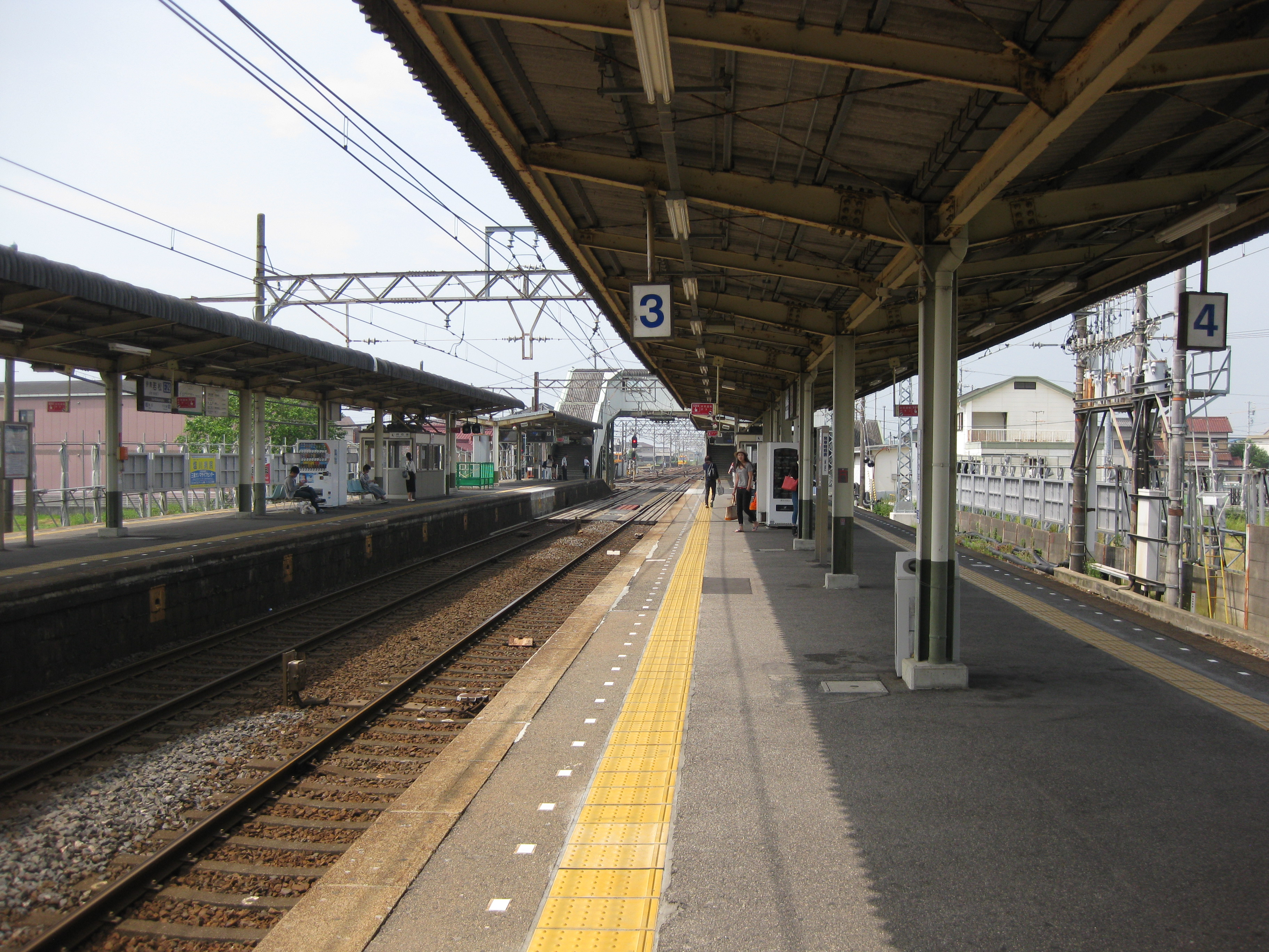 伊勢若松駅プラットホーム